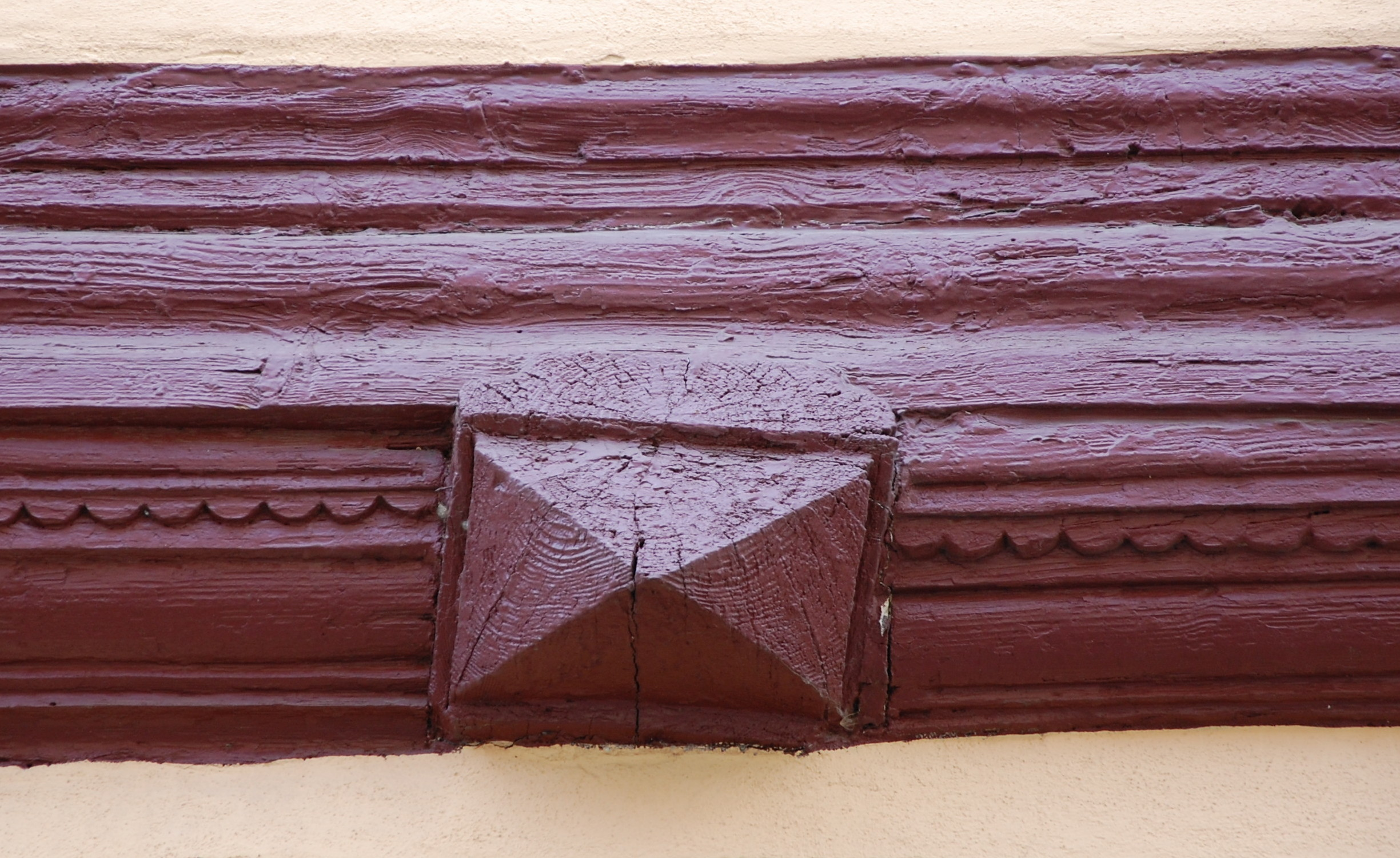 Pyramidenbalkenkopf an Gröpern 30